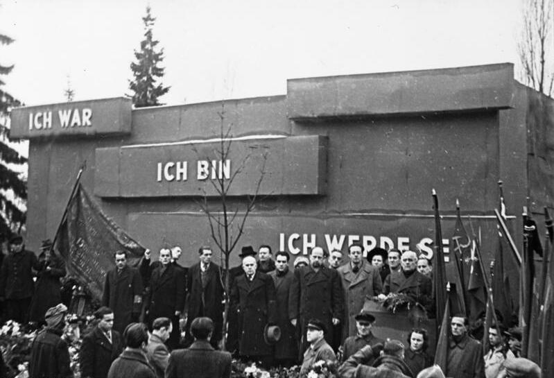 Berlin-Friedrichsfelde, Demonstration, Wilhelm Pieck Zentralbild/IML Am 13. Januar 1946 demonstrierten die Arbeiter Berlins zu den Gräbern von Karl Liebknecht, Rosa Luxemburg und den anderen Revolutionskämpfern. Wilhelm Pieck bei seiner Gedenkrede. nach Links: Franz Dahlem, Waldemar Schmidt, Walter Ulbricht IML Nr. 257/65 [Berlin-Friedrichsfelde.- "Gedenktag der Sozialisten" an der Gedenkstätte der Sozialisten mit Provisorium anstelle des "Denkmals für Karl Liebknecht und Rosa Luxemburg" bzw. "Revolutionsdenkmal" von Ludwig Mies van der Rohe mit der Aufschrift "Ich war. Ic] Abgebildete Personen: Pieck, Wilhelm: Präsident, Politbüro der SED, Vorsitzender der KPD, DDR Dahlem, Franz: Stellvertretender Minister Hoch- und Fachschulwesen, Internationale Brigaden, DDR Schmidt, Waldemar: Präsident Volkspolizei Berlin, stellvertretender OB, Volkskammerabgeordneter, DDR Ulbricht, Walter: Staatsratsvorsitzender, Erster Sekretär des Zentralkomitees (ZK) der SED, Vorsitzender des Nationalen Verteidigungsrates, DDR